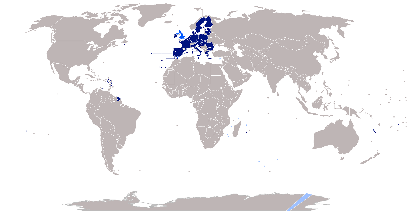 Vorlage von SrDash17 (Originaldatei)